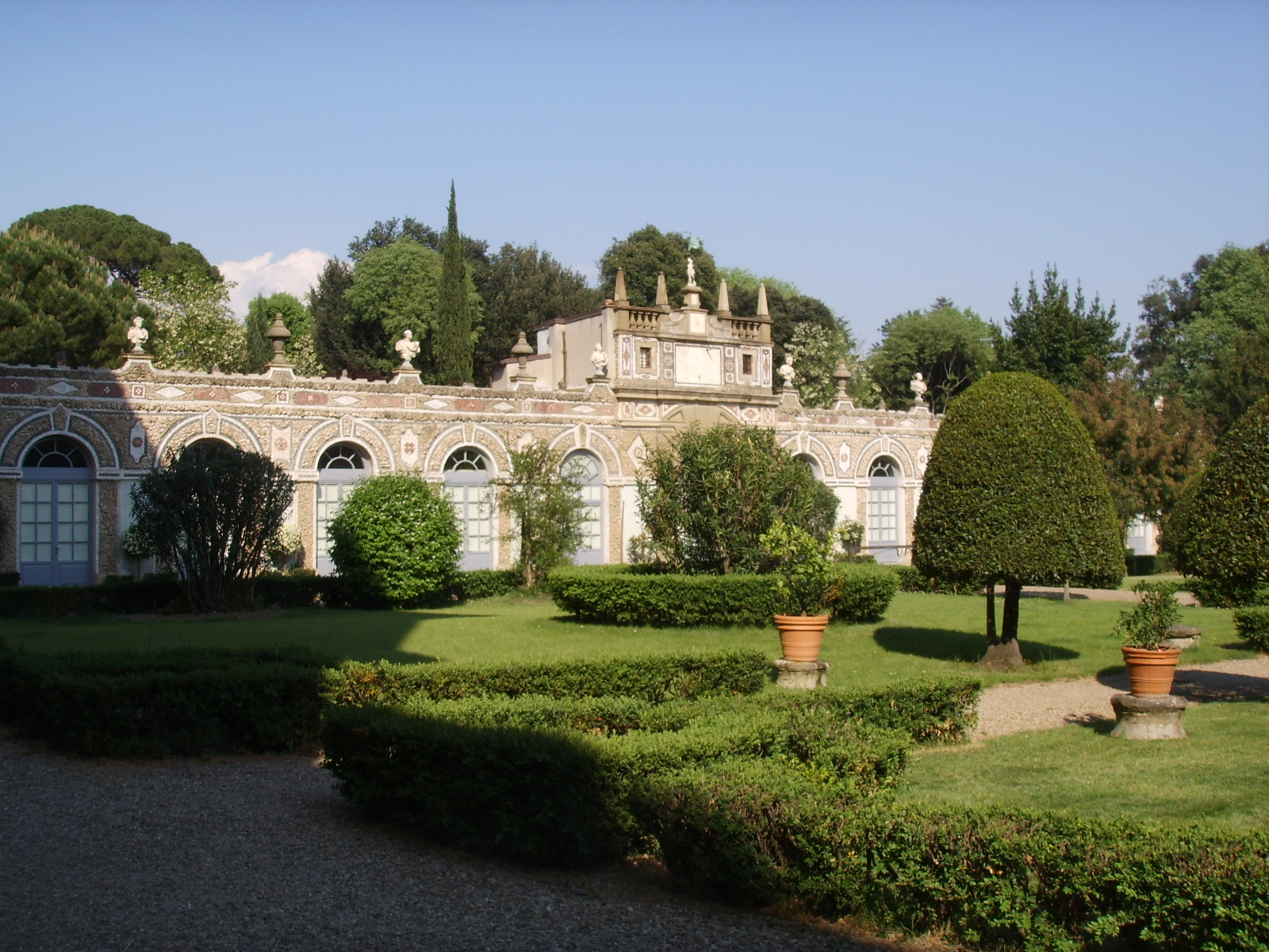 Palazzo_di_Gino_Capponi garden in Florence